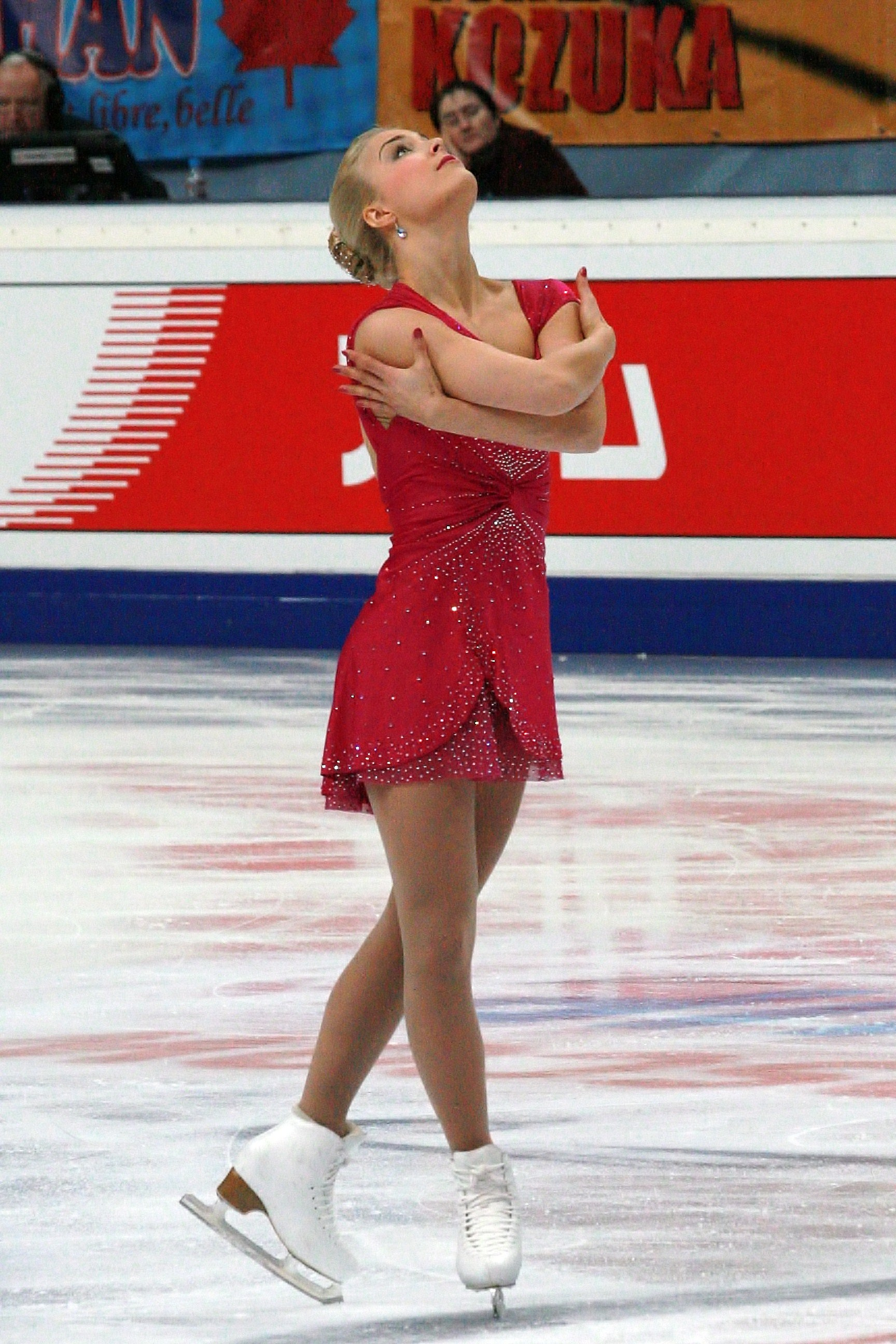 Киира Корпи (Финляндия) на Кубке Ростелекома 2012. Короткая программа.